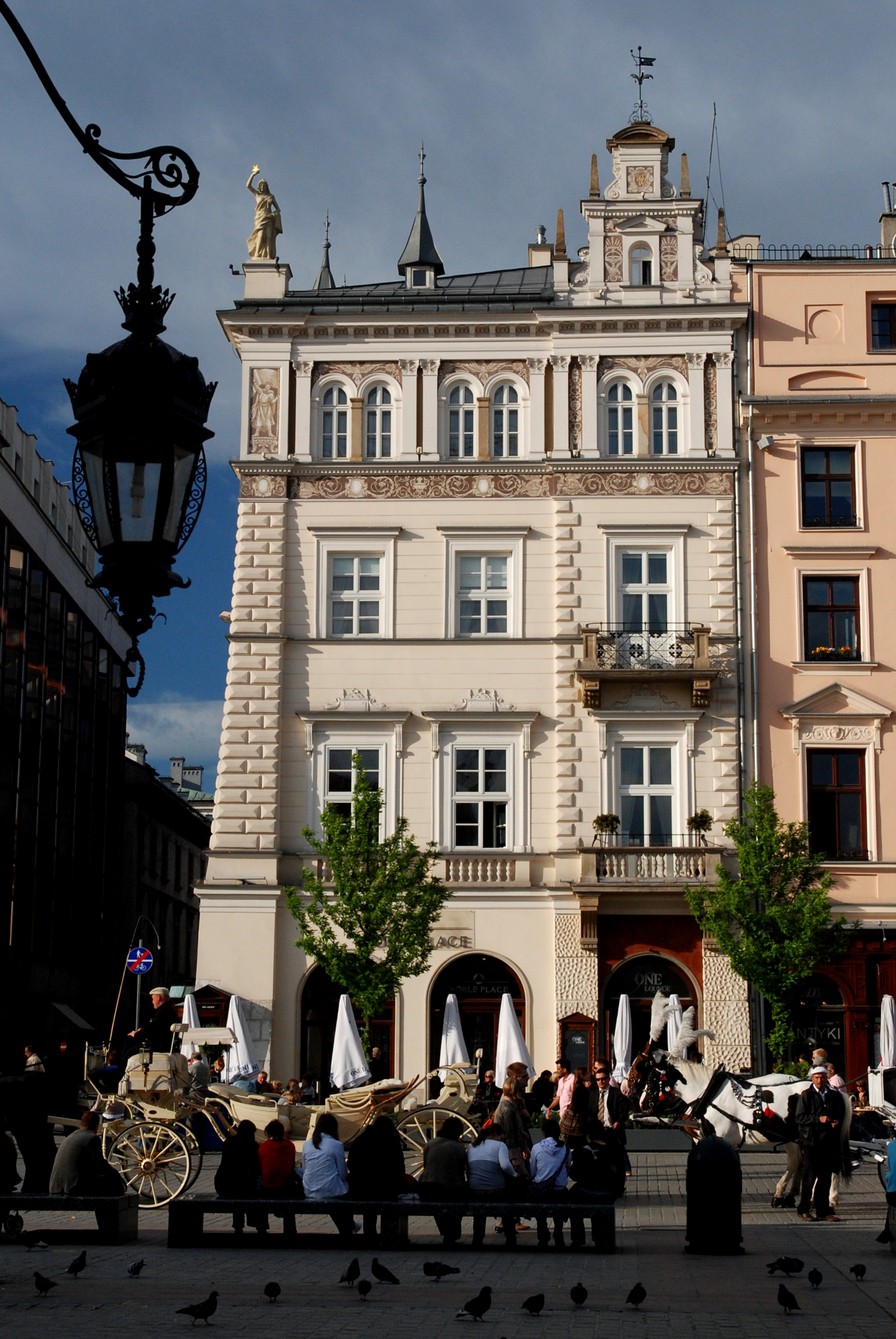 Kamienica Bonerowska (Zacherlowska), Rynek Główny nr 42, Kraków